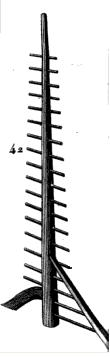 Gravure représentant un écharasson, échelle destinée à cueillir les fruits